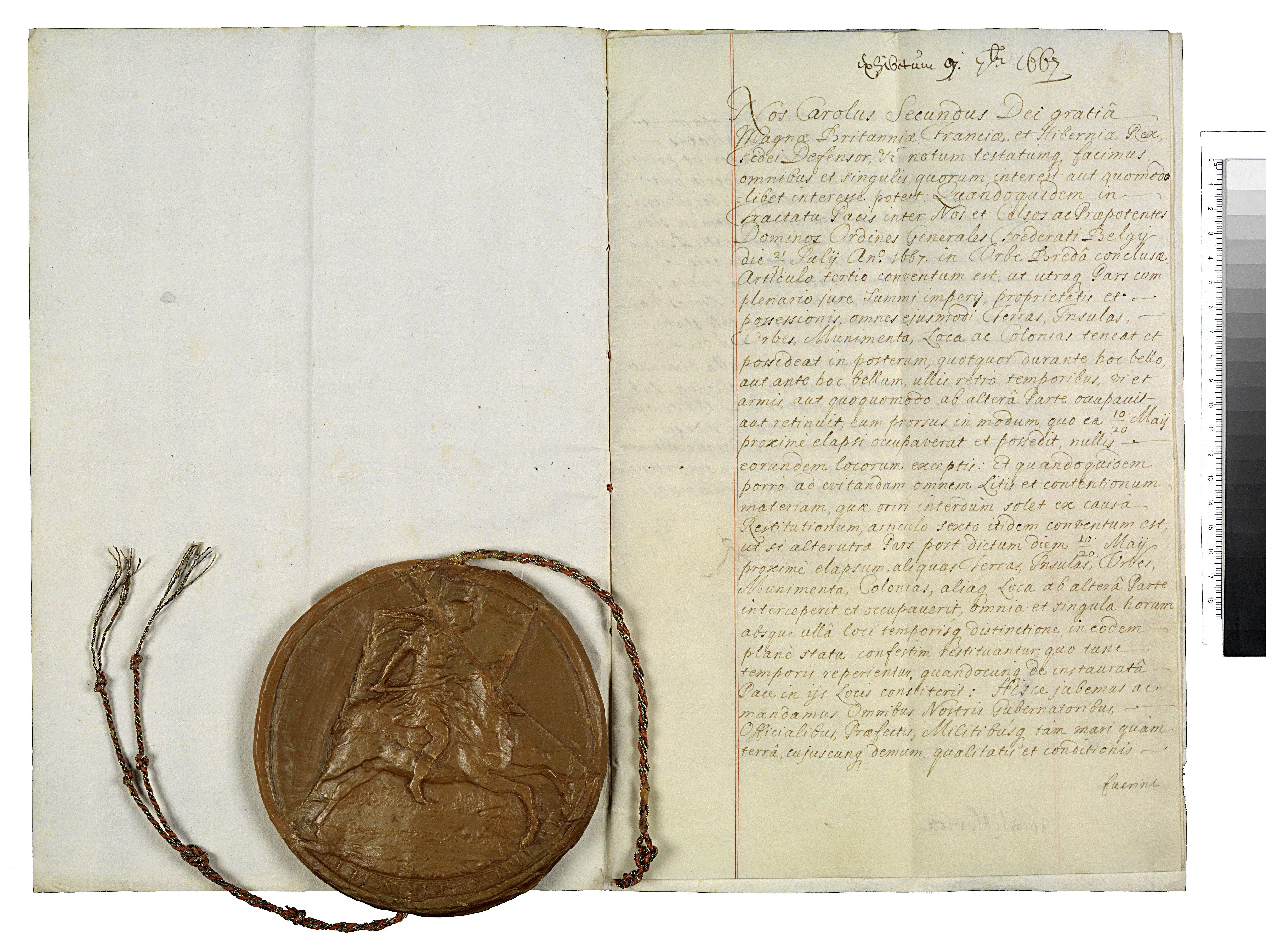 Akte van traktaat van vrede met afzonderlijke artikelen te Breda gesloten tussen de Staten-Generaal en de koning van Engeland. Met gedrukte afkondigingen van de vrede, door de tractanten mede getekend.